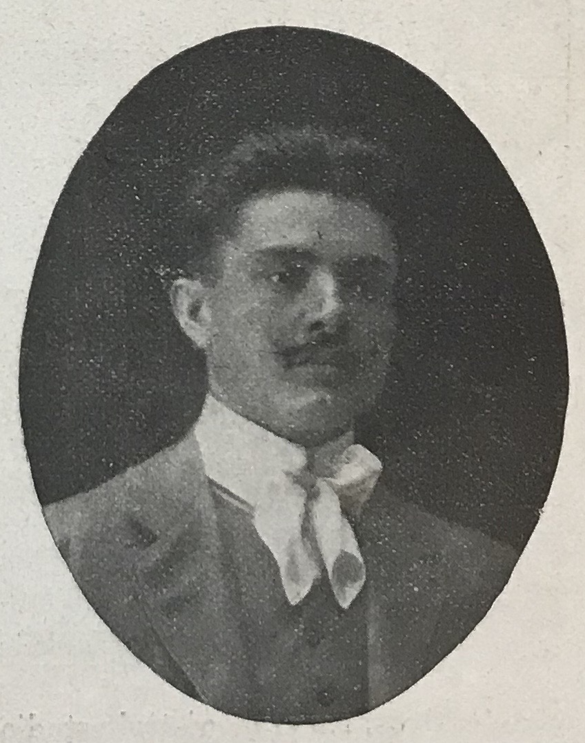 Imatge extreta del llibre d'Emilio Navarro (1915), Historia crítica del republicanismo catalán en la última década (1905-1914), p. 149.